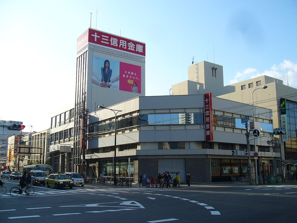 十三信用金庫本店（新北野交差点）